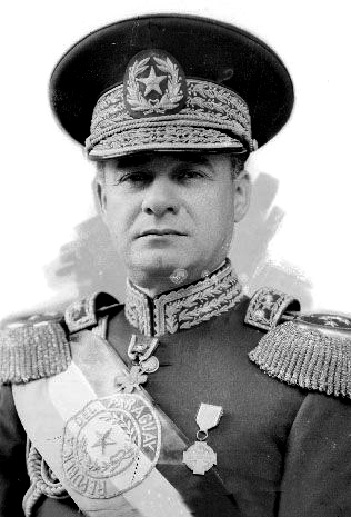 Mcal. José Félix Estigarribia Insaurralde